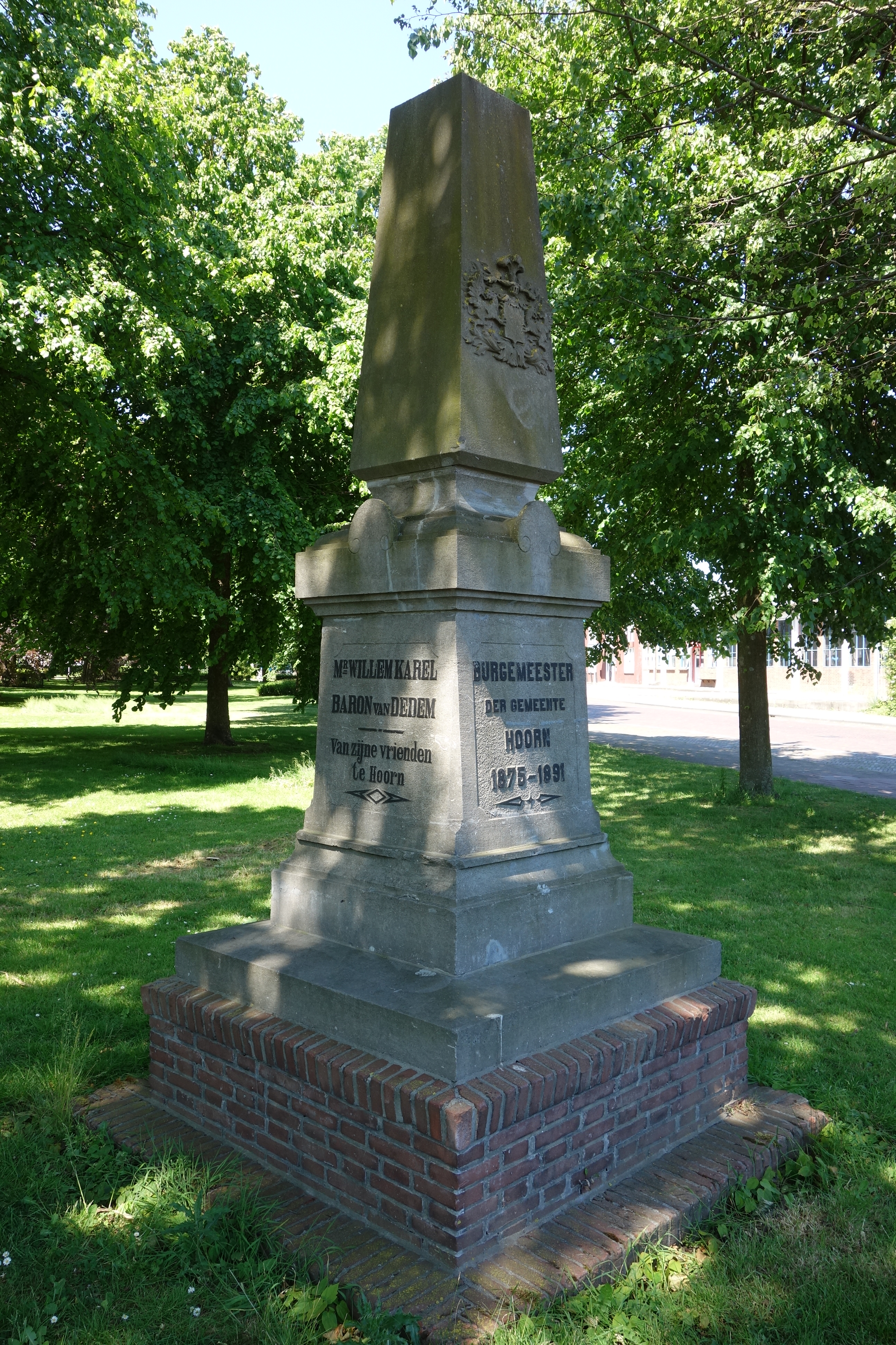 Pilaar ter herinnering aan burgemeester Van Dedem in het Noorderplantsoen in Hoorn.